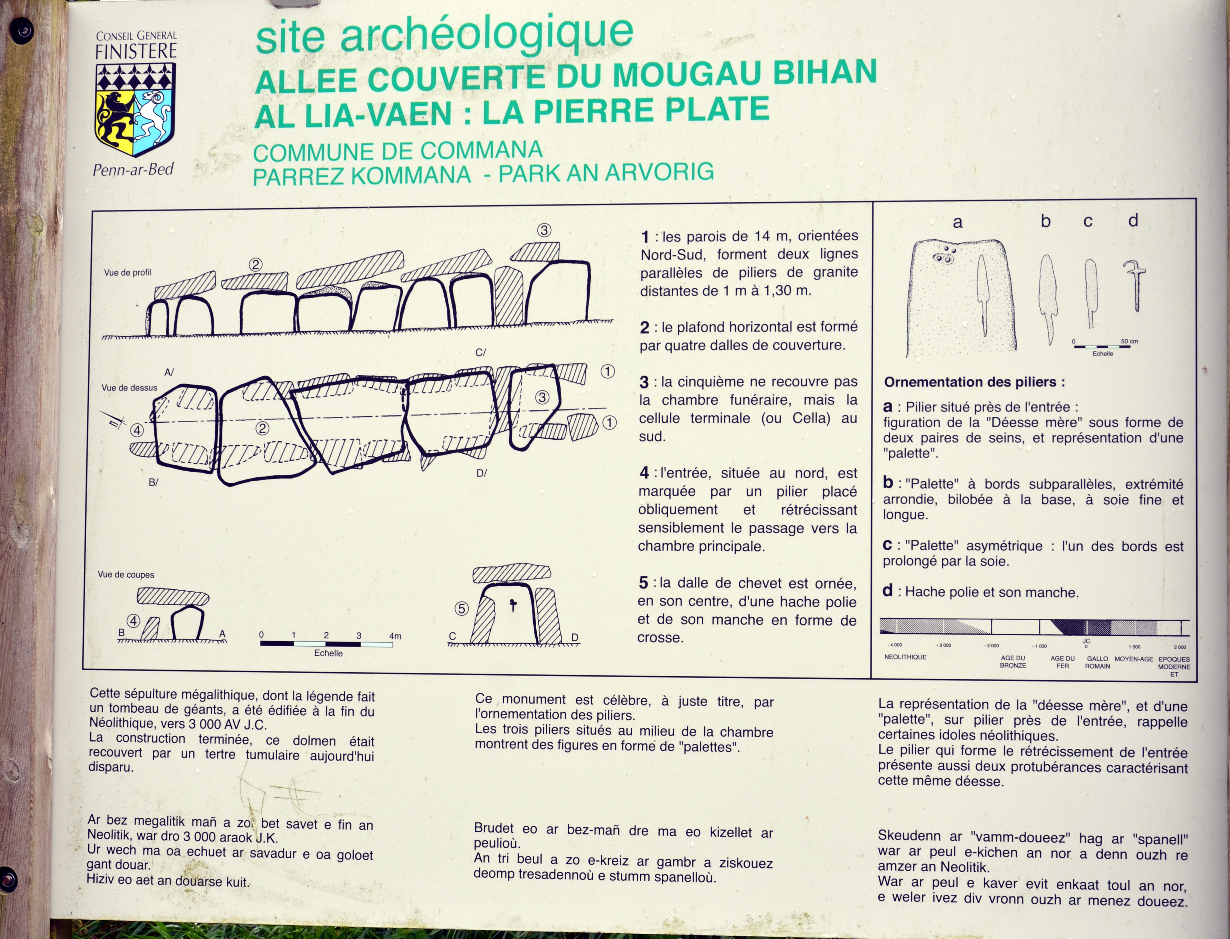 Allée couverte du Mougau-Bihan, sur la commune de Commana (Bretagne, France)